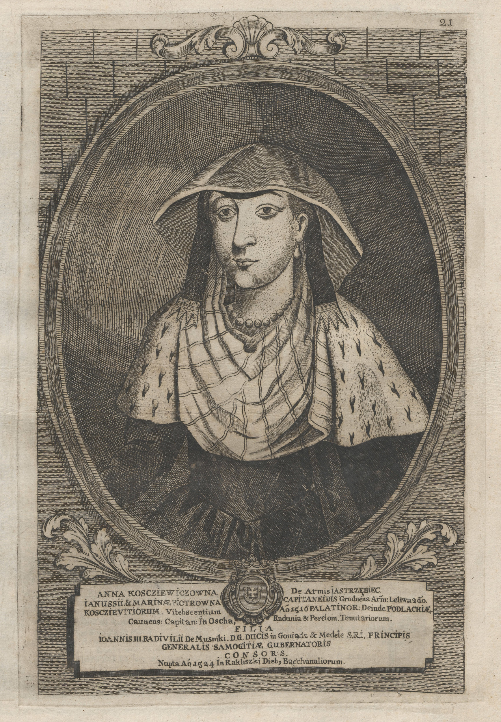 Беларуская (тарашкевіца): Партрэт Ганны Радзівіл (Hanna Radzivił) з роду Касьцевічаў (Kaścievič)